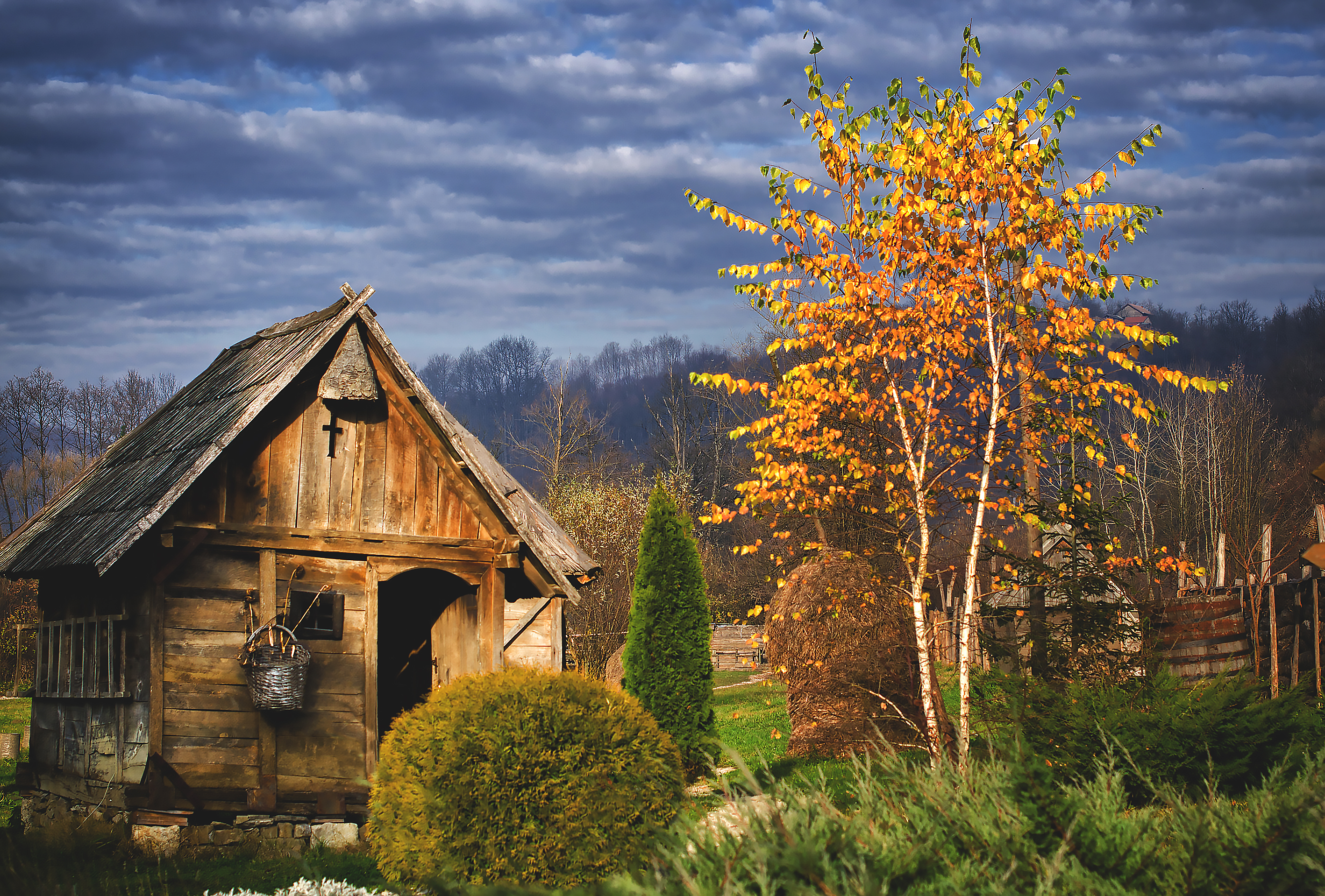 Kraljevsko selo Kotromanićevo je turističko etno-selo u okolini Doboja, izgrađeno u privlačnom prirodnom ambijentu, pored magistralnog puta koji vodi od Doboja ka Derventi.